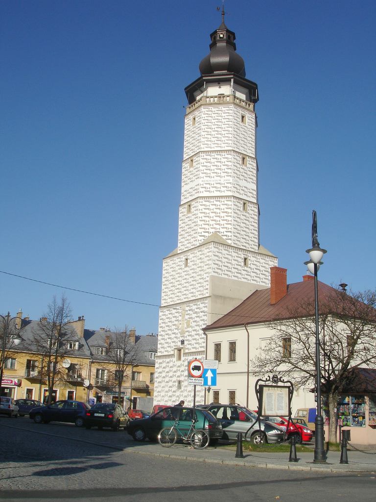 Biecz, Fotograf marek Silarski